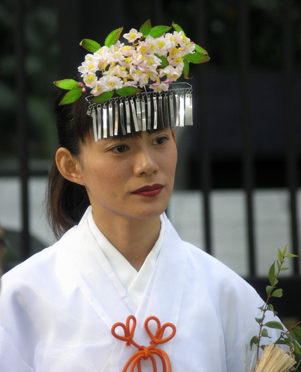 Sacerdotista xintoísta participando de um festival japonês na Praça do Japão, em Curitiba, Paraná.